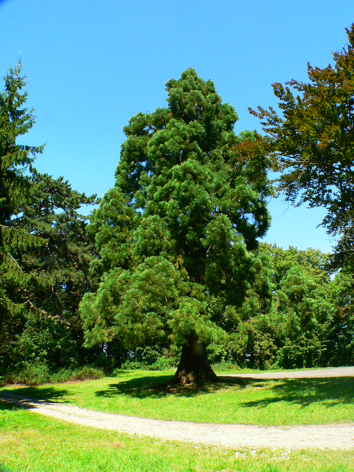 Schloss Callenberg bei Coburg (Germany, Bavaria): 20 m hoher Mammutbaum (Sequoiadendron giganteum) im Schlosspark